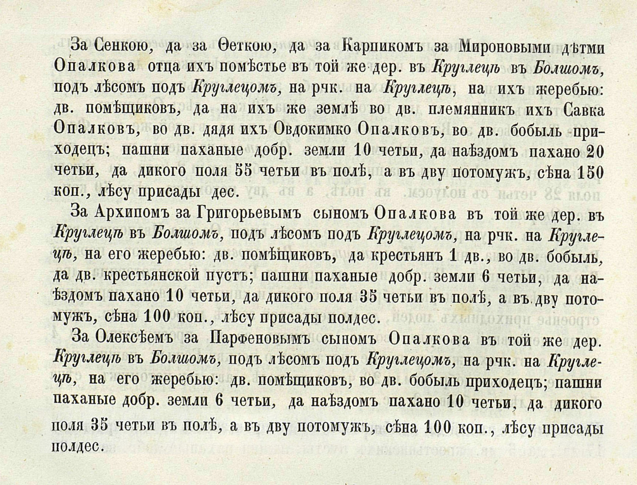 из Писцовой книги Орловского уезда 16 века